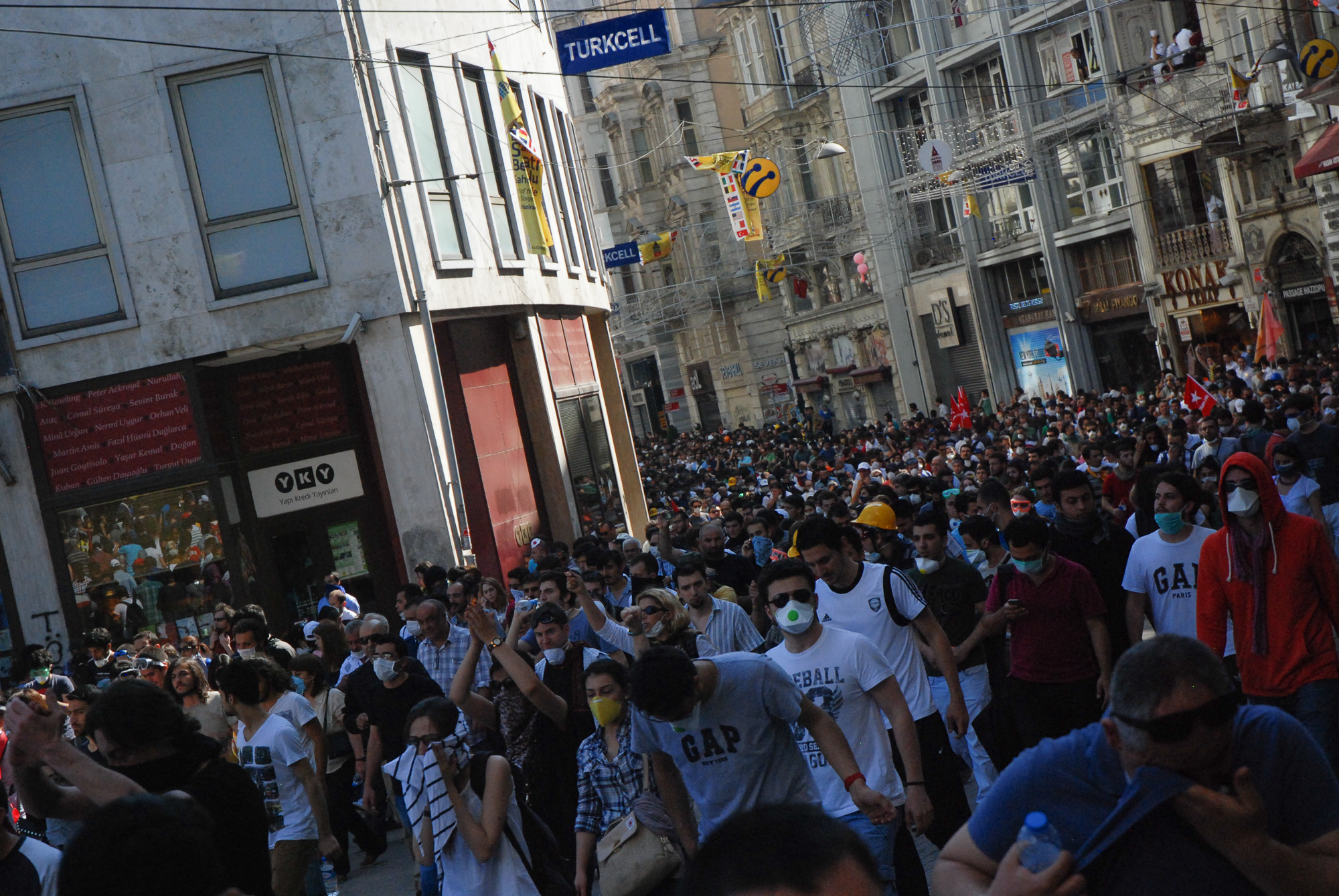 Gezi protestors in İstiklal Avenue on June 1, 2013.